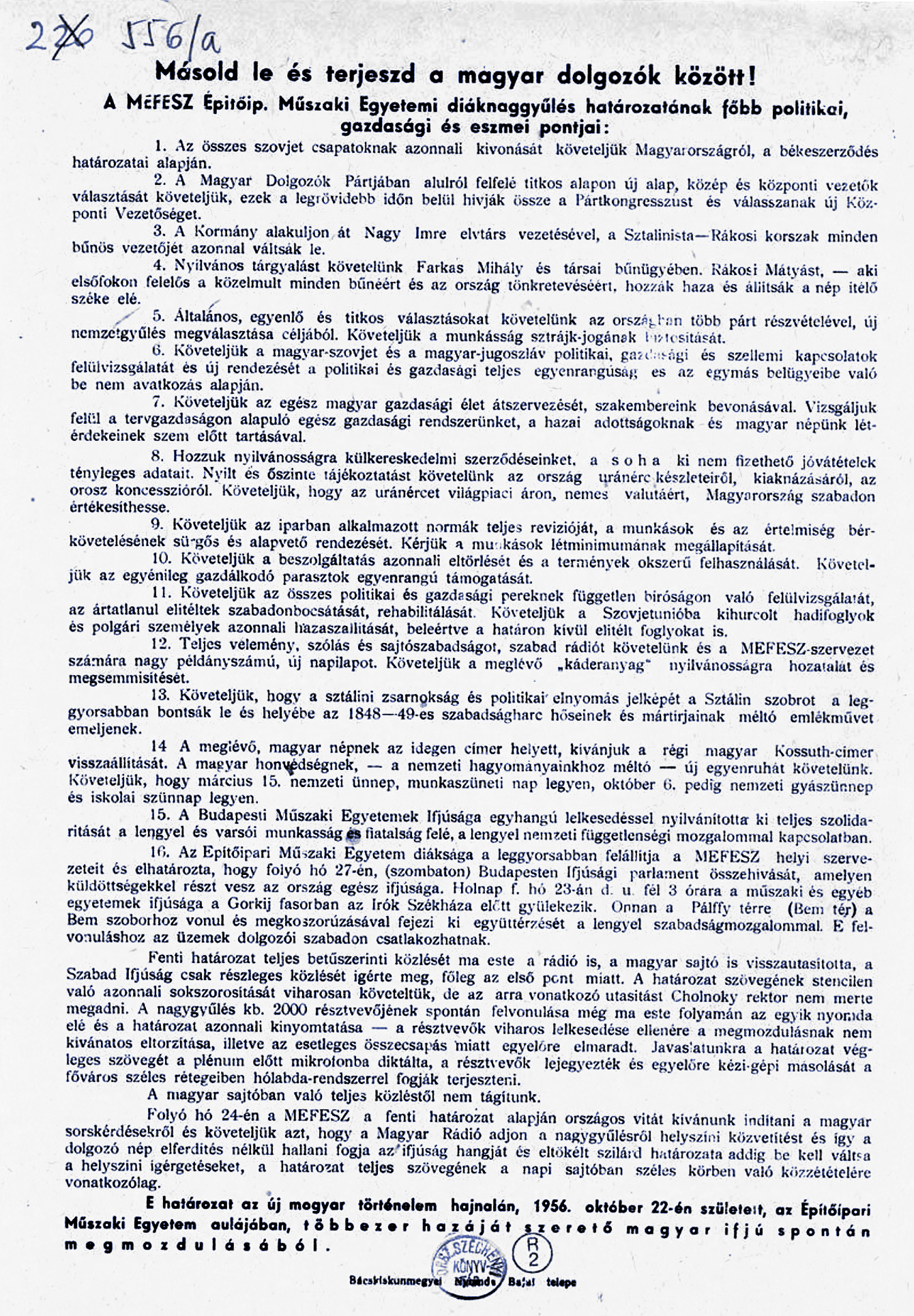 A műegyetemisták 16 pontja 1956-ban